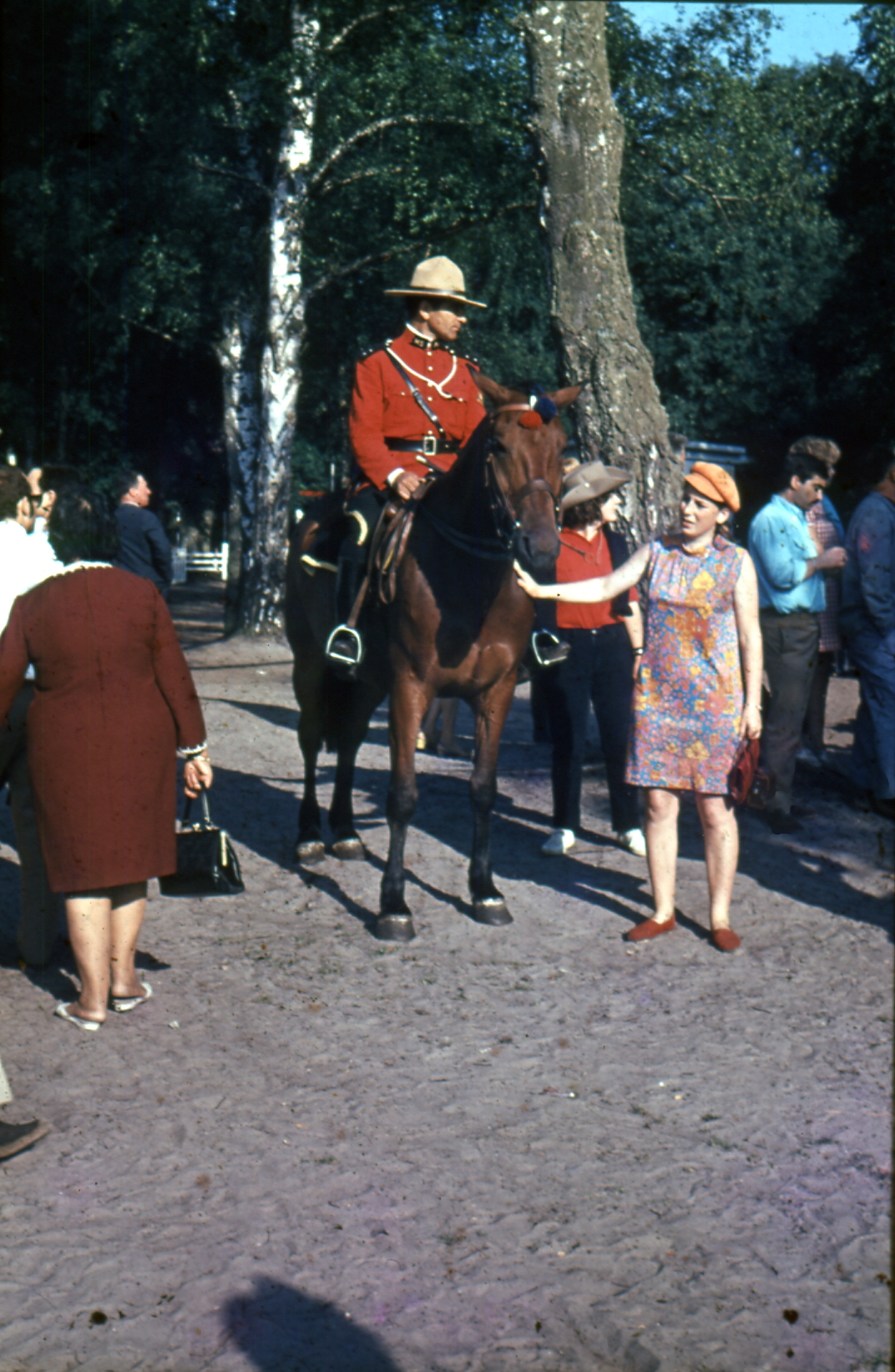 Ermenonville Mer De Sable - reconstitution Police Montée 1966